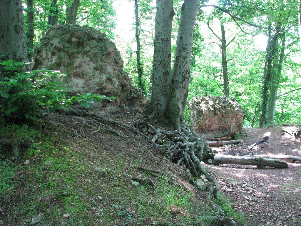 Hirschburg in Hirschberg-Leutershausen